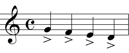 Markato